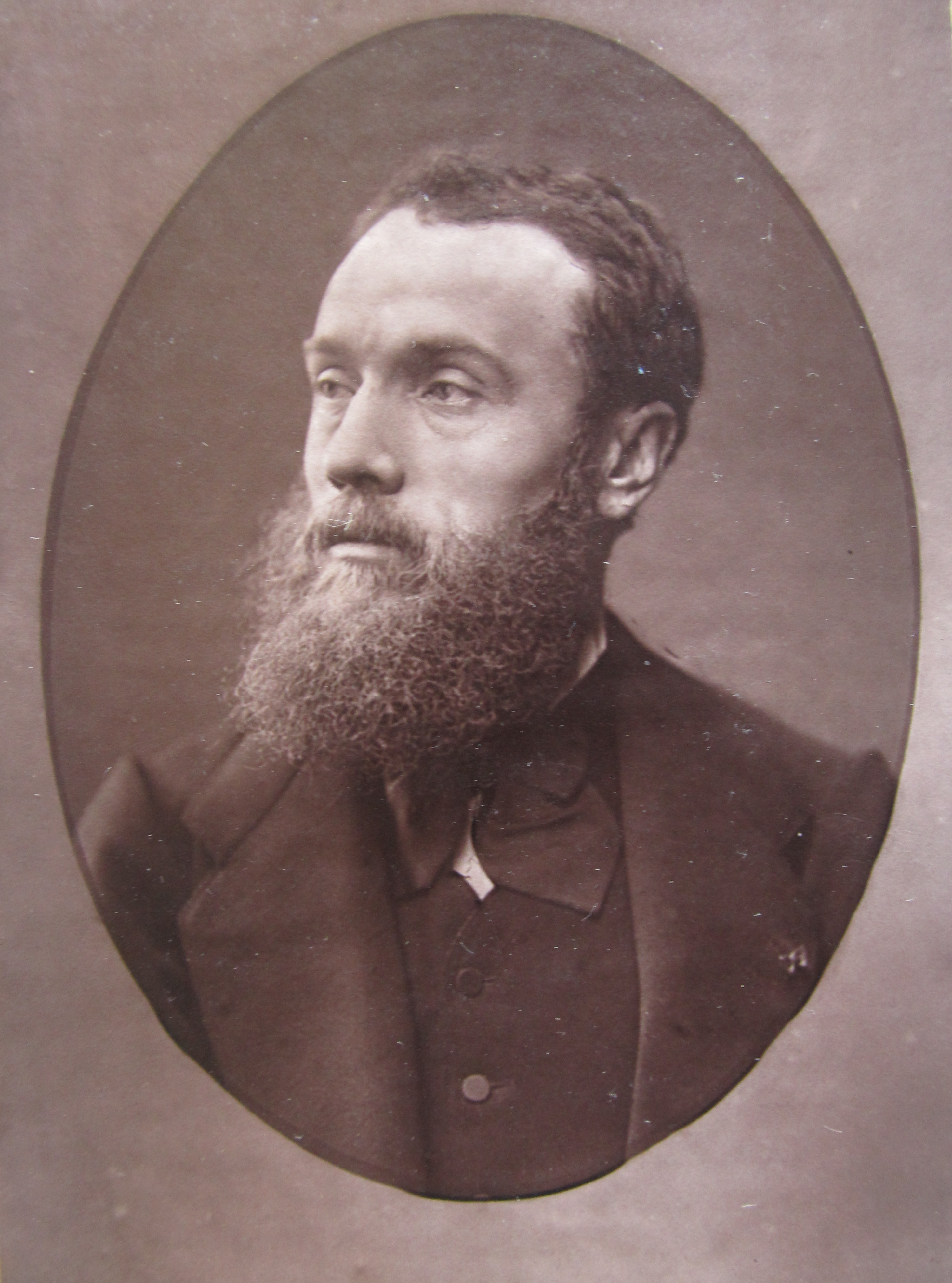 Photoglyptie Lemercier & Cie, 1878. (Planche provenant du Journal hebdomadaire du "PARIS-PORTRAIT". FORMAT: Une planche de 8.5 x 12 cm contrecollée au centre du feuille de 29 x 39 cm.